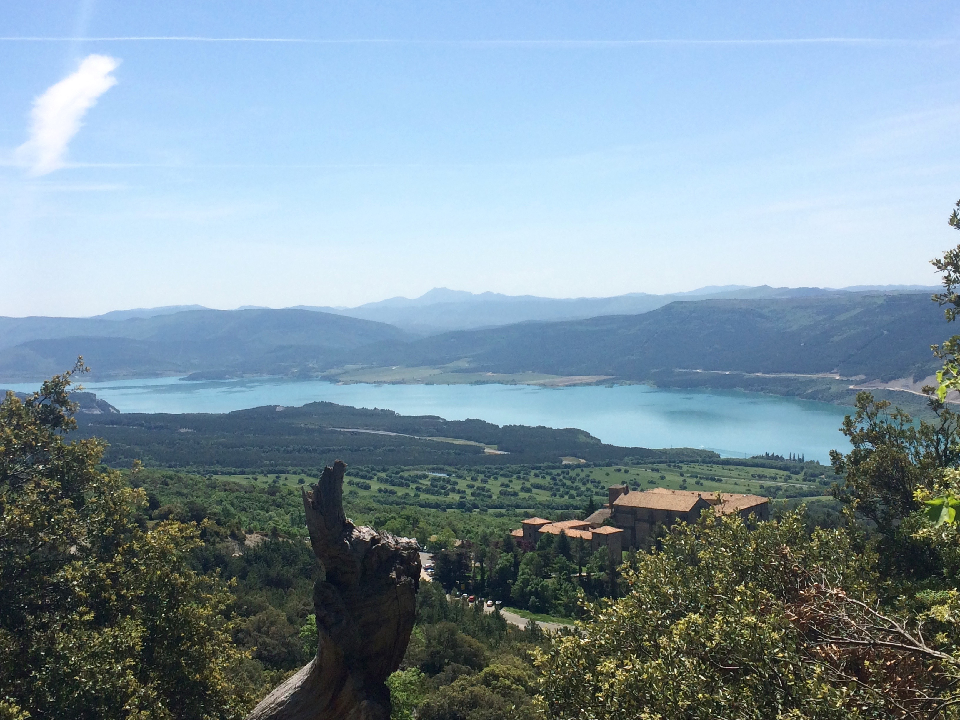 Sierra de Leire y Foz de Arbayún This is a photography of a Site of Community Importance in Spain with the ID: ES0000125. Natura2000 entry, EEA entry